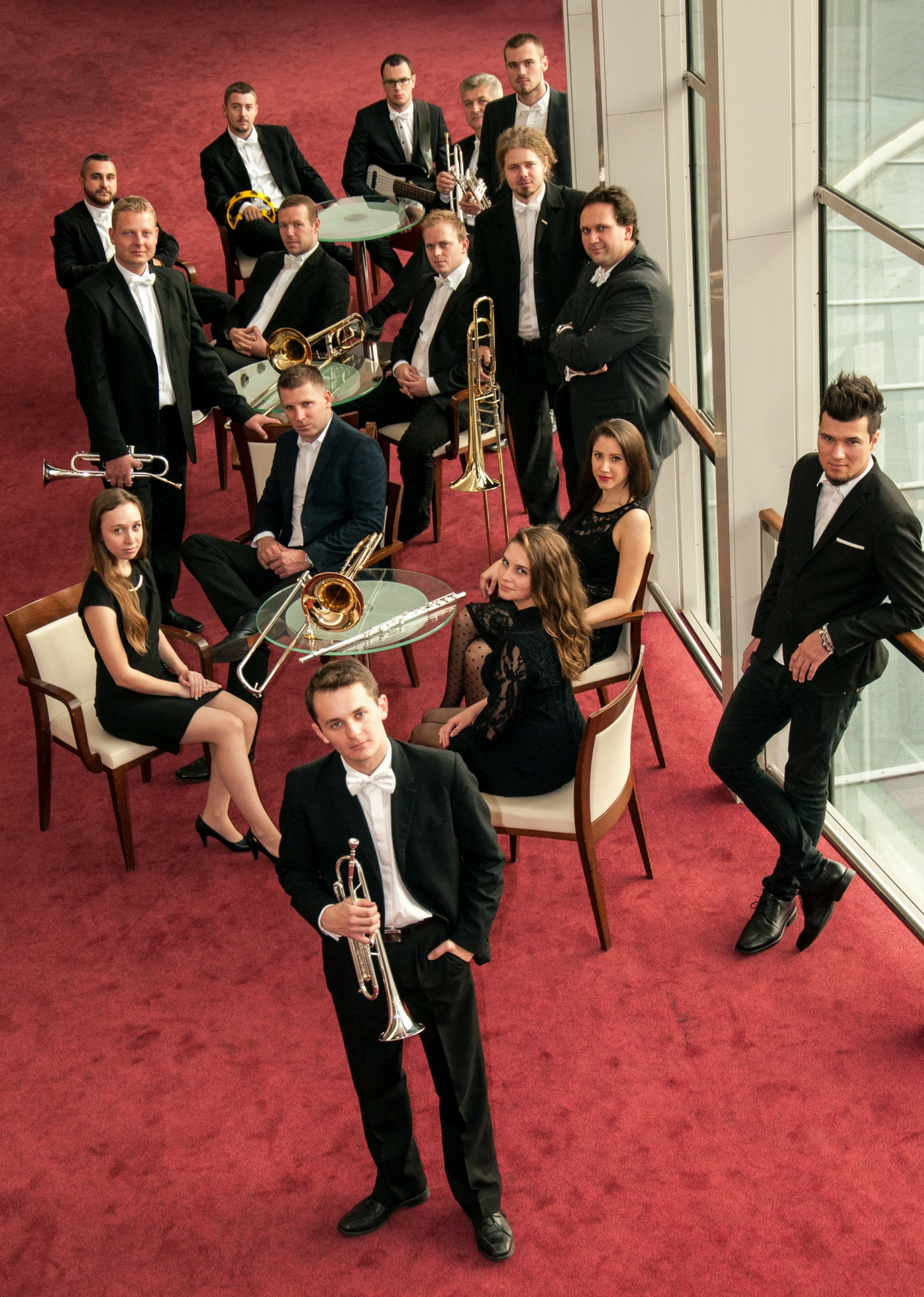 Orchester Taste of Brass v SND